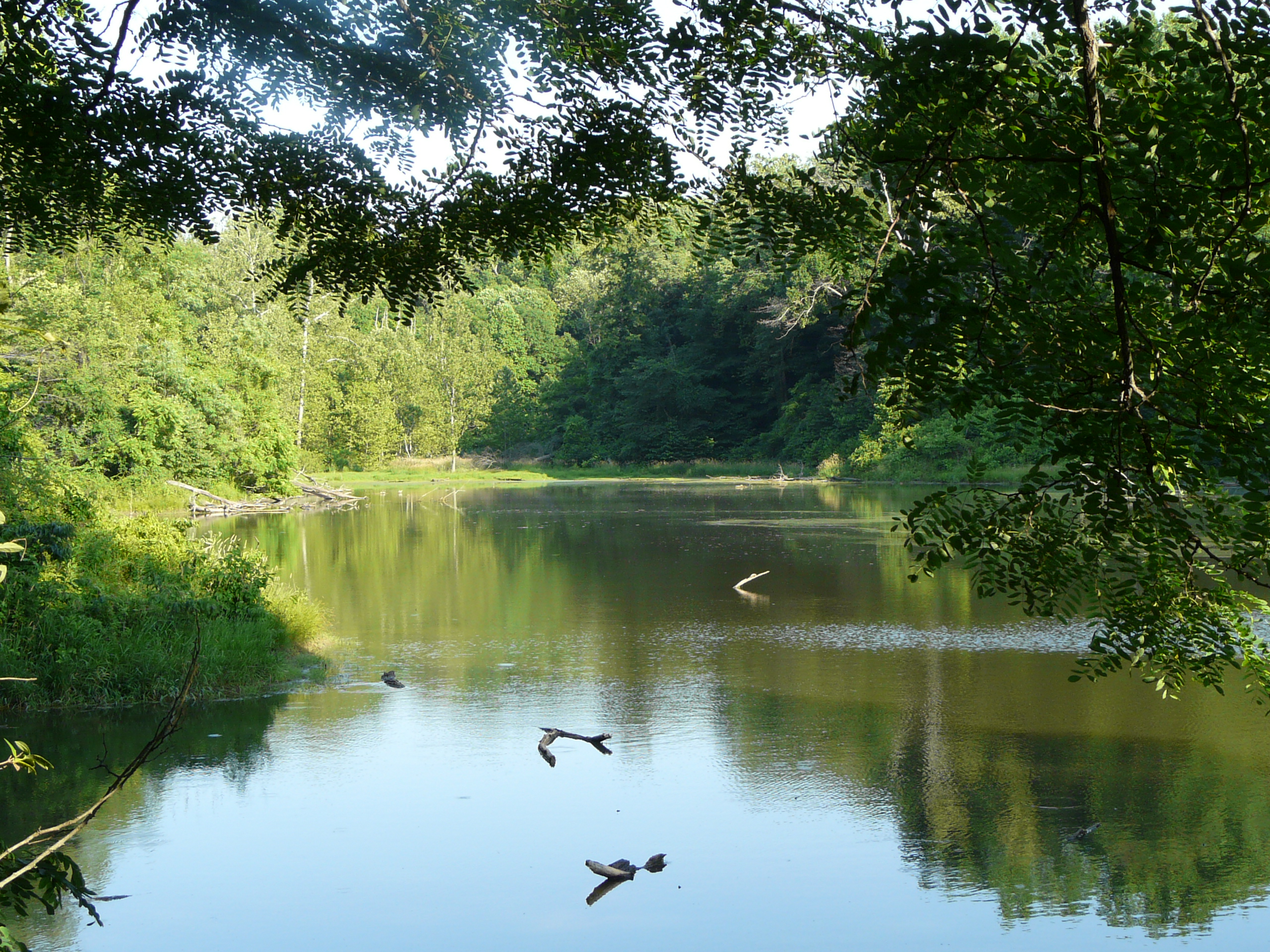 Wilderness Lake, Audubon State Park, Kentucky